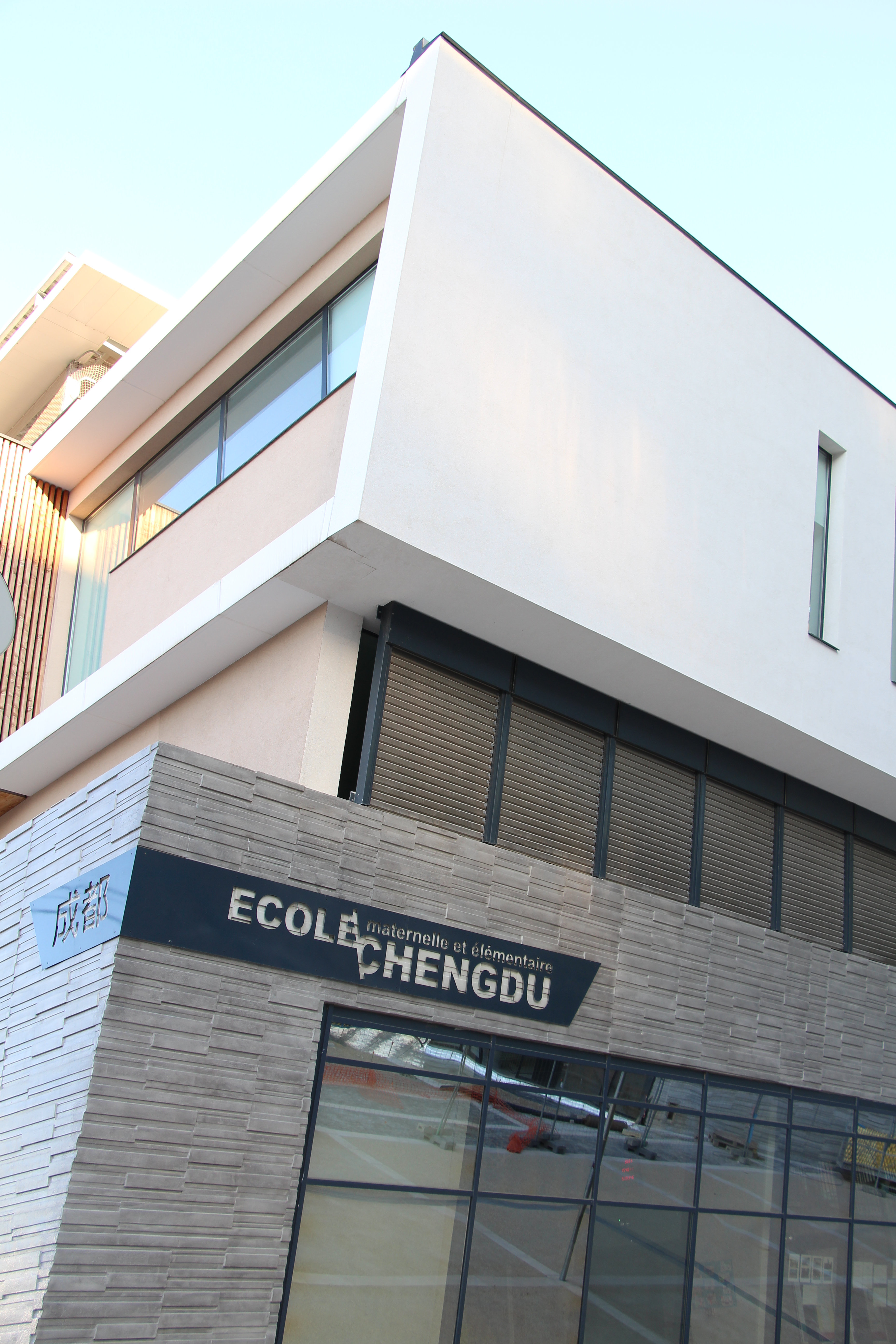 Groupe Scolaire ChengDu Quartier Port Marianne Montpellier